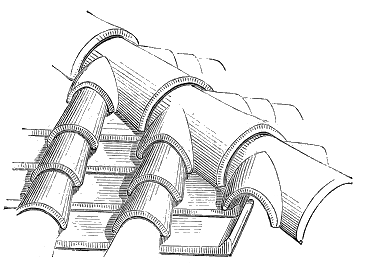 ... pour les constructions faites avec soin, on fabriquait des tuiles d'arêtiers spéciales, en raison de la pente de la toiture. Ces tuiles d'arêtiers étaient munies d'oreillons qui s'emboitaient sur les tuiles couvre-joints des pans (voy. la fig. 3). Ainsi n'était-on pas obligé de sceller ces arêtiers à l'aide du mortier. Il ne faut pas omettre les tuiles gouttières posées à la base des combles en guise de chéneaux, pour recevoir les eaux pluviales et les conduire. dans des tuyaux de descente de terre ou dans des gargouilles saillantes ...